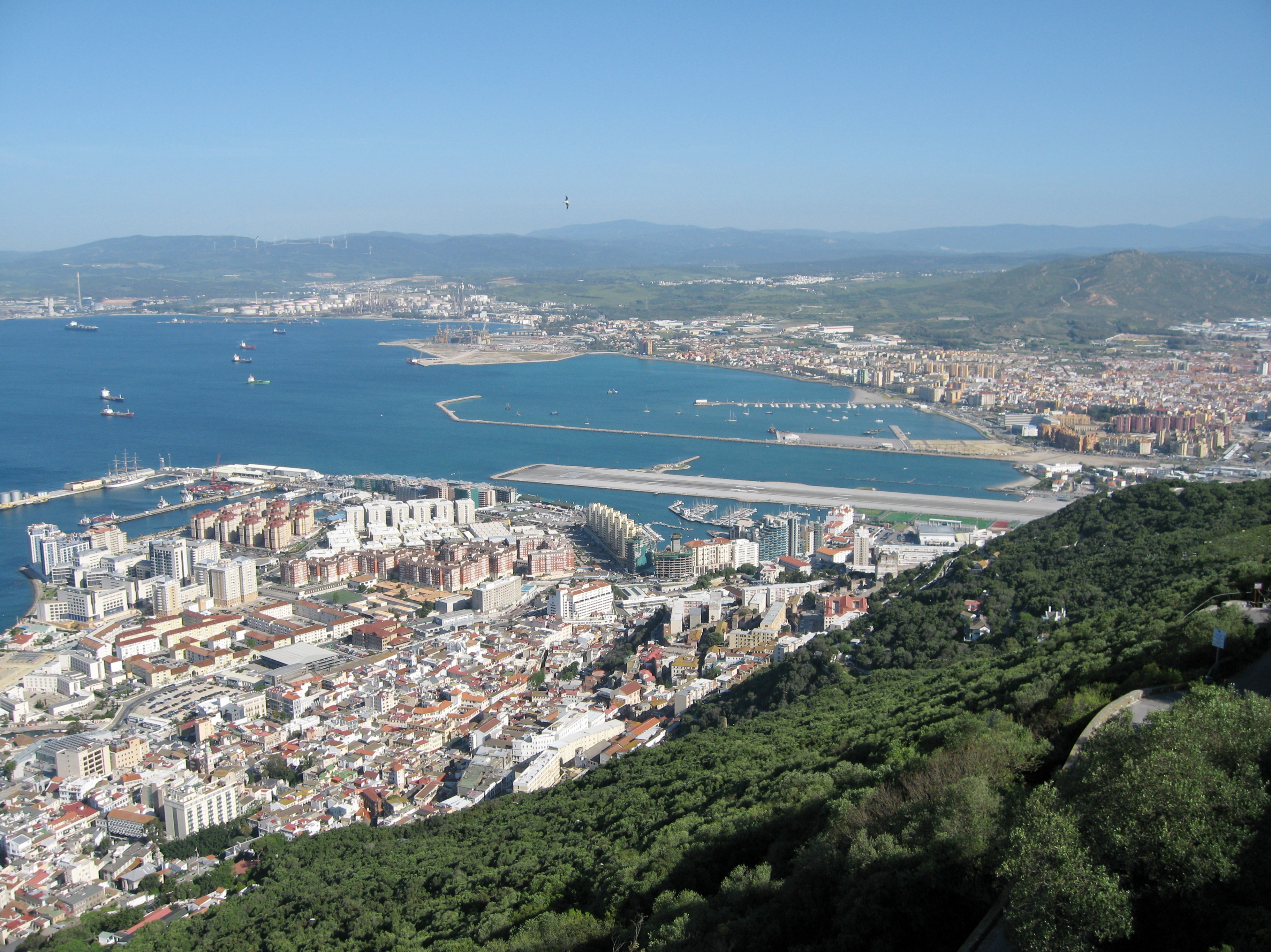 Gibraltar, Bucht von Algeciras (Bahía de Algeciras), Blick Richtung Gibraltar Airport und La Línea de la Concepción